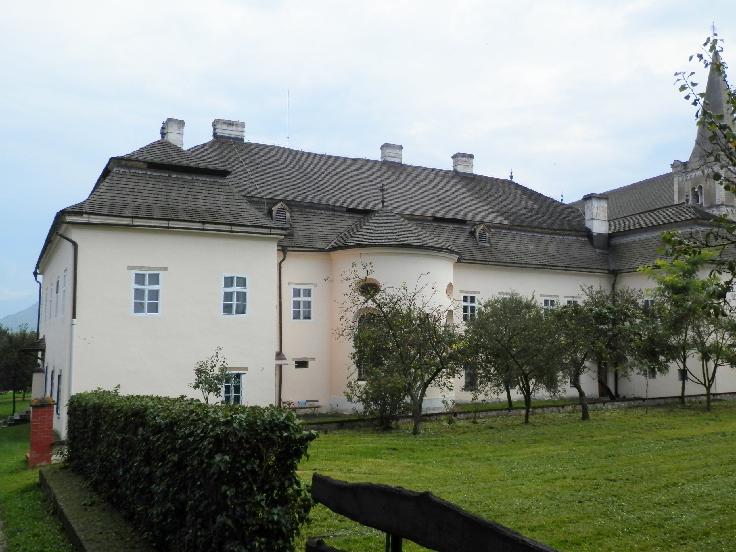 Neskororenesančný biskupský palác z roku 1652 s barokovou úpravou. Spišská Kapitula-Spišské Podhradie.